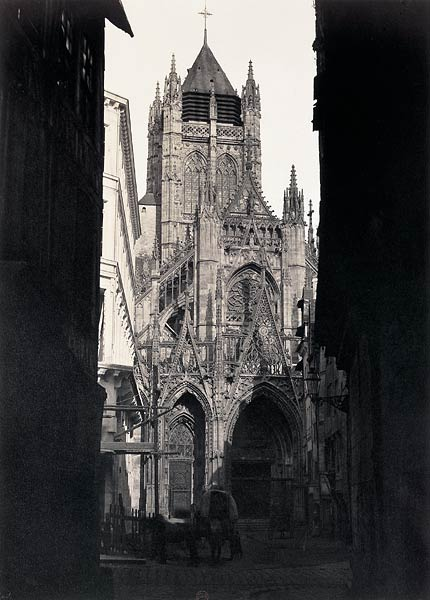 "Église St-Maclou. Portail principal", planche XI, Vers 1855-1856 Album Principaux monuments de Rouen par Bisson [1] f.-[15] f. de pl.15 photographies sur papier albuminé d'après négatif sur verre au collodion précédées d'une table manuscrite Signature : timbre humide noir "Bisson frères" sur le montage en bas à droite de l'image Reliure de J. Bovelé, 7 rue Guénégaud, Paris. Chagrin violet, encadrements de filets à froid et dorés, coins ornés, le plat supérieur frappé au centre du monogramme couronné de l'empereur "LNL" entrelacés. Titre au dos. Gardes en moire blanche Acquisition 11 648, ancienne collection Gilles Bibliothèque nationale de France, Département des Estampes et de la Photographie,Ve 1510 folio Réserve